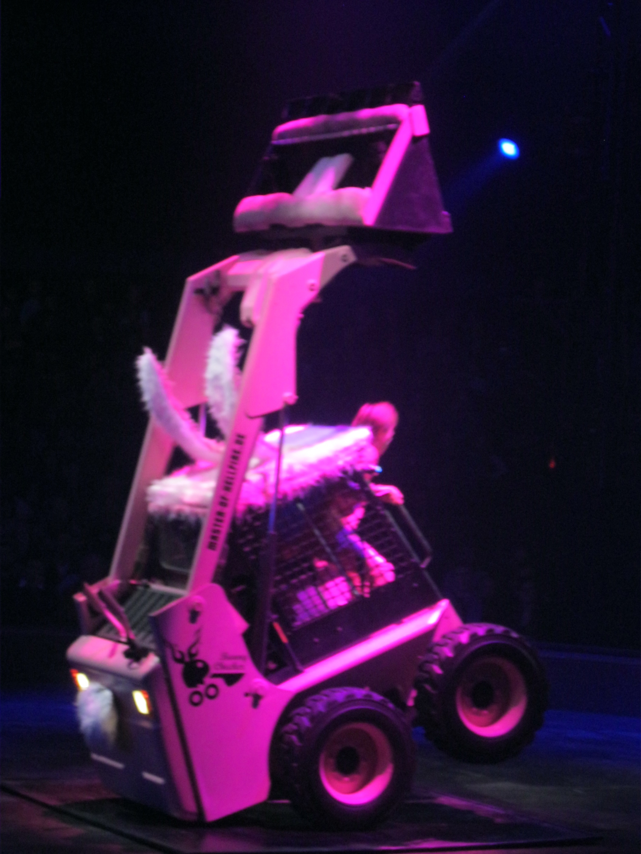 Numéro avec un tractopelle au cirque Arlette Gruss à Bordeaux en janvier 2013.